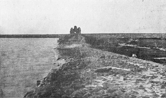 La digue du lac de Homs, retenant les eaux de l'Oronte, avec sa tour romaine